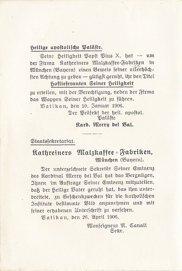 Kathreinerova továrna na sladovou kávu získáva titul Dvorní dodavatel Jeho Svatosti.